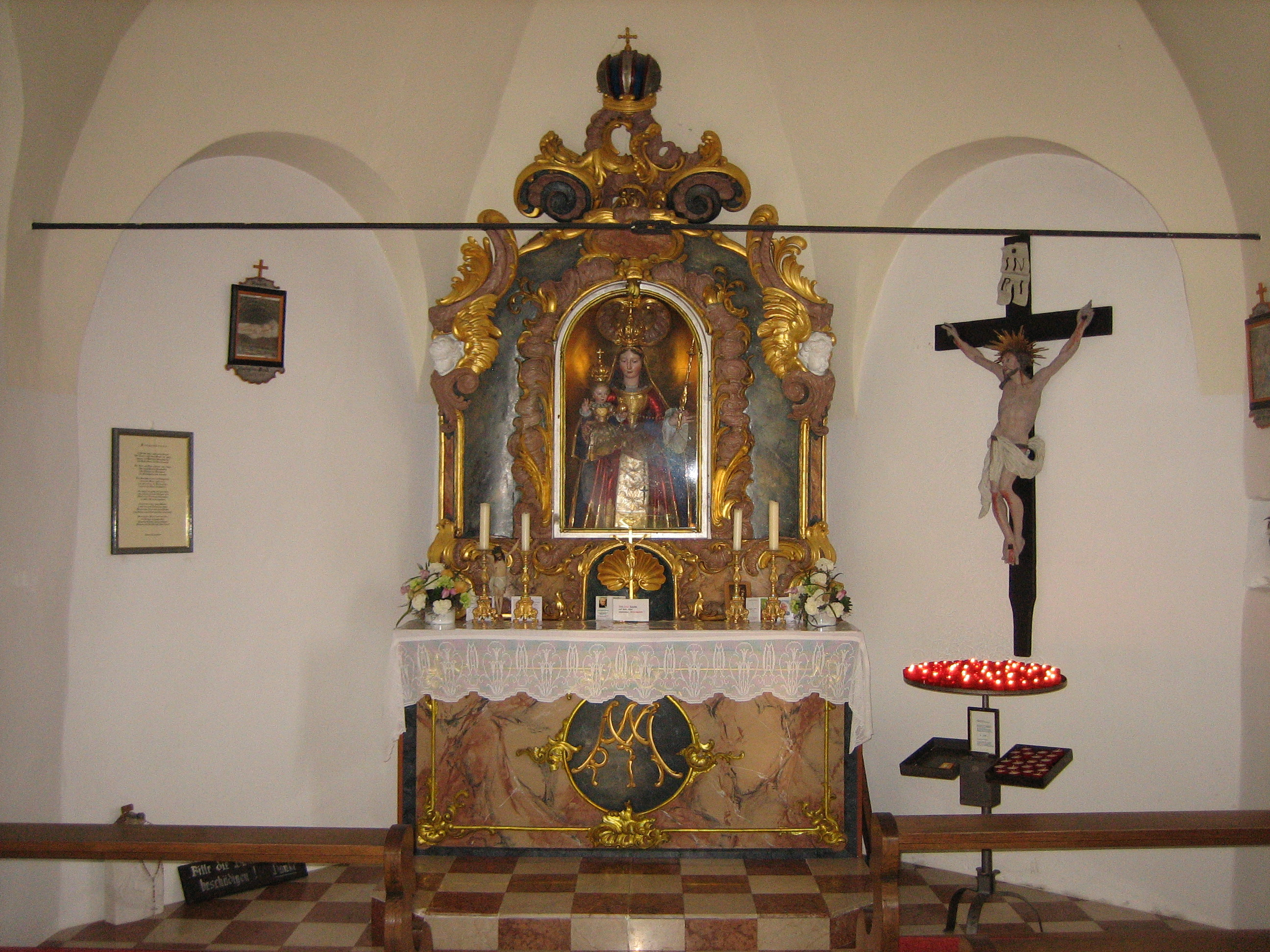 Kapelle Unserer Lieben Frau zu Sinnesbrunn